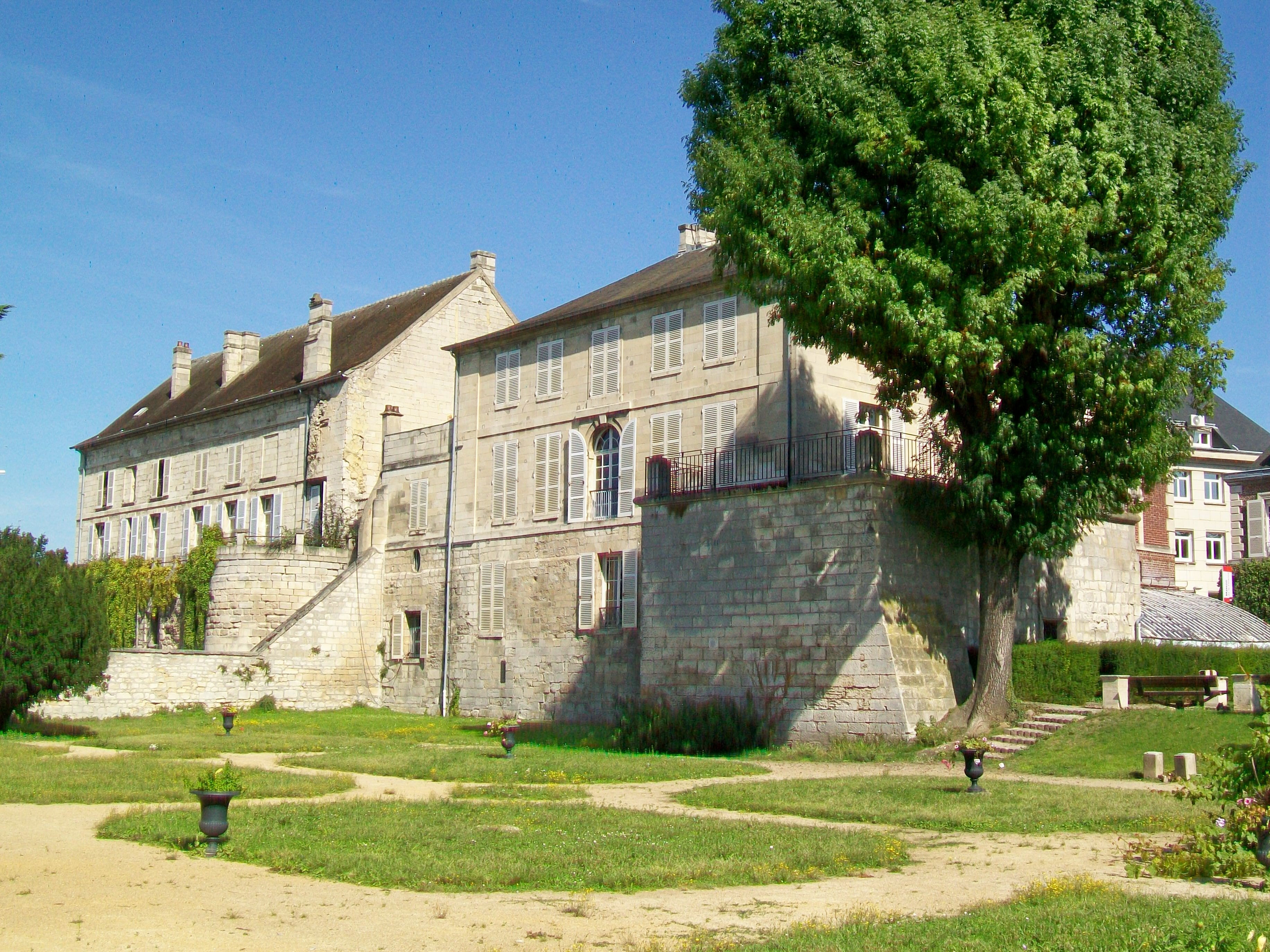 L'ancien hôtel Gallé-Juillet, vu depuis le sud-ouest ; le bâtiment ancien en arrière-plan ne fait pas partie du musée.